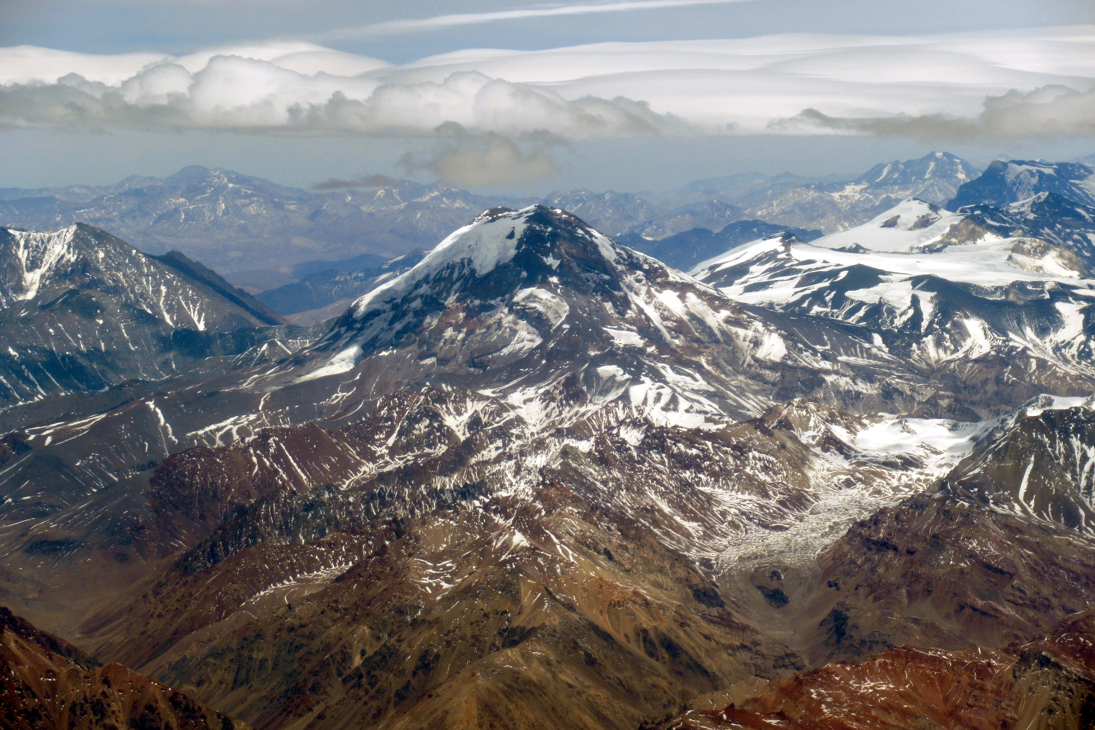 El Tupungato (6660 m s.n.m., distancia 55 km) y el Tupungatito. El volcán Maipo (5264 m s.n.m., distancia 145 km) detrás del Tupungatito. Altitud de vuelo 8450 m s.n.m. aproximadamente.